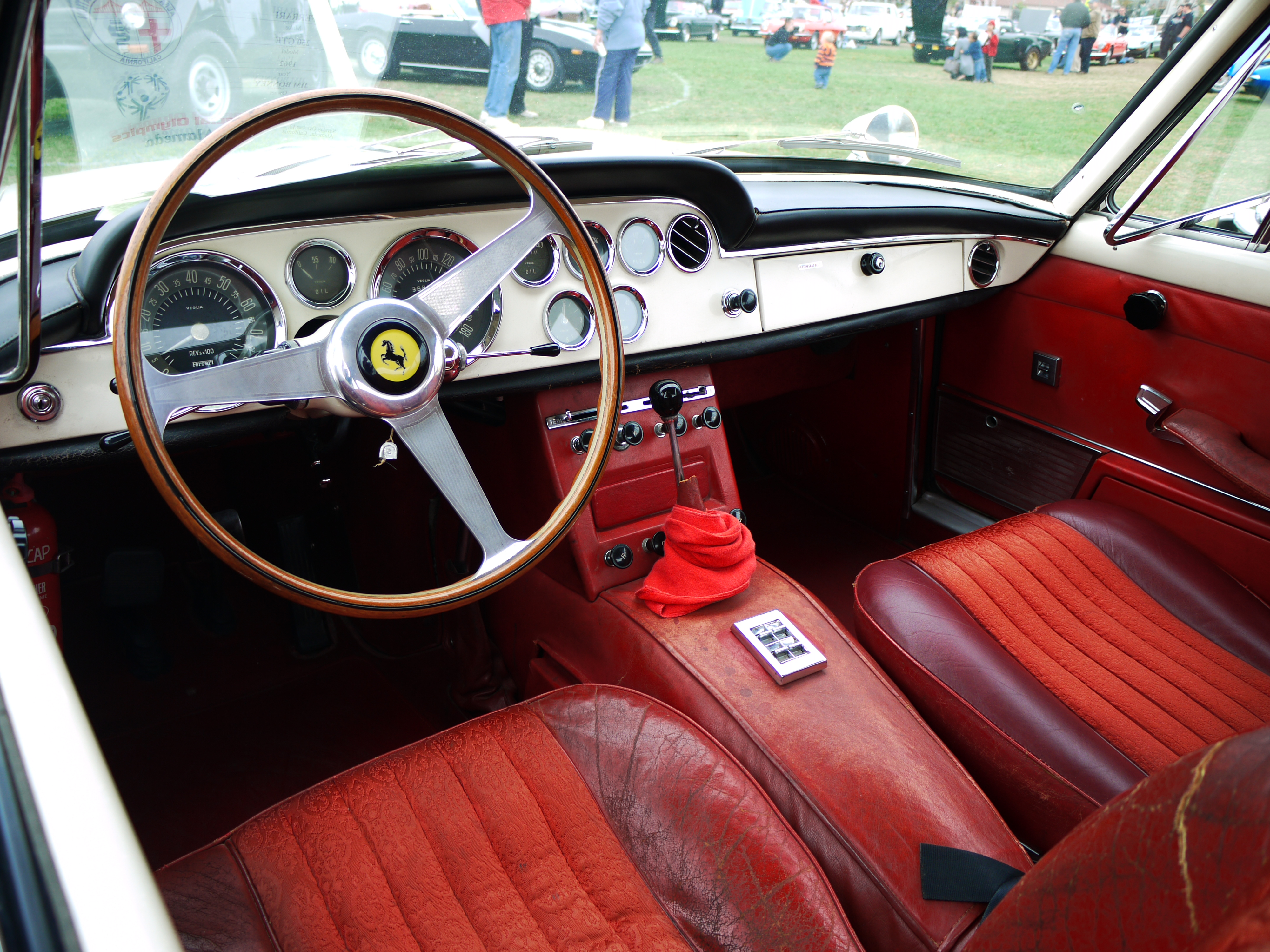 Habitacle d'une Ferrari 250 GTE